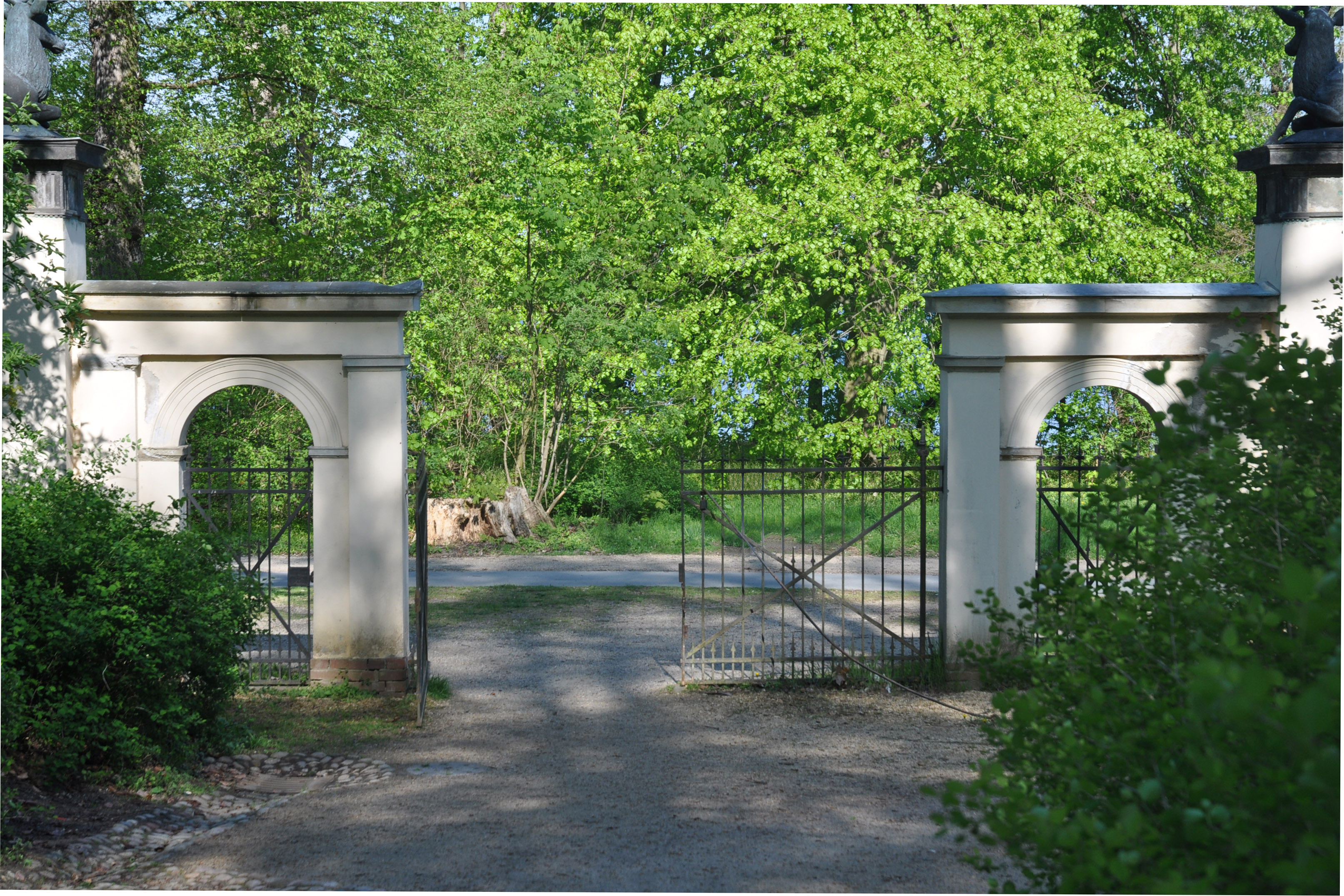 Park Klein-Glienicke, Torflügel des Wassertores